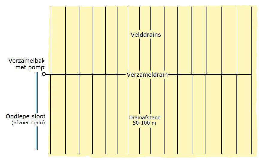 Drainage system in India